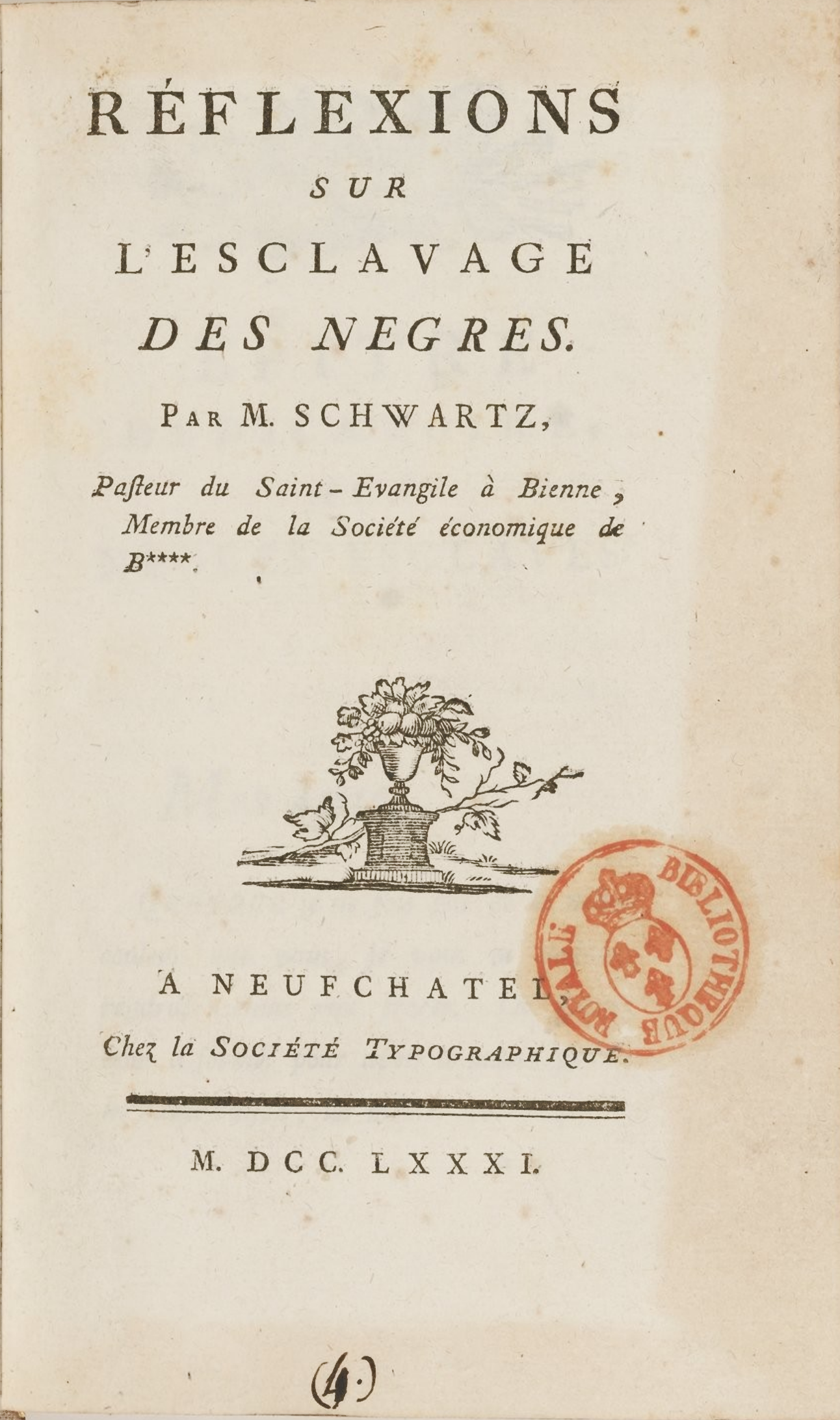 Page de titre de Jean-Antoine-Nicolas de Caritat de Condorcet.- Réflexions sur l'esclavage des nègres, Neuchâtel, Société typographique de Neuchâtel, 1781.